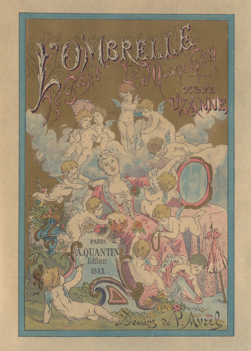 Octave Uzanne: L'Ombrelle - Le Gant - Le Manchon, Paris, Quantin 1883. Cover by Paul Avril (Der Schirm - Der Handschuh - Der Muff)